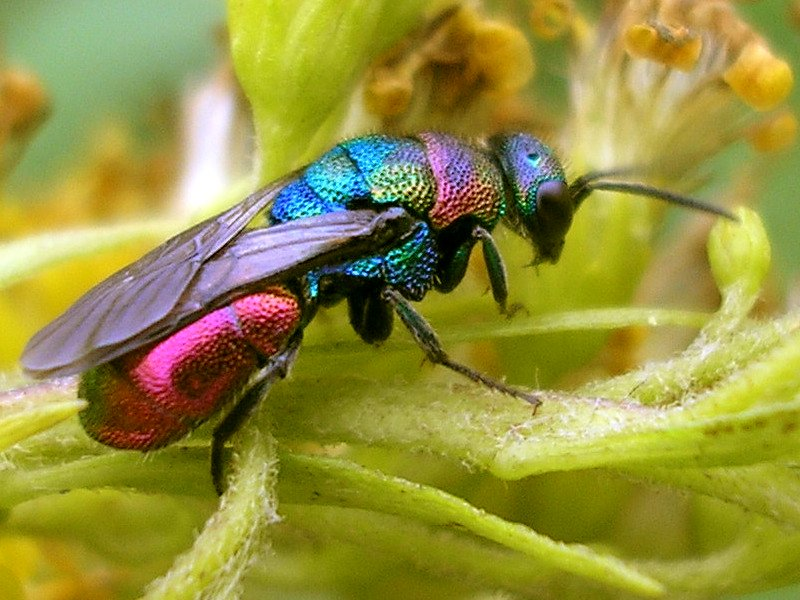 This Chrysididae on a goldenrod was identified as Hedychrum rutilans (Dahlbom, 1854) thanks to Christian Schmid-Egger (HymIS.de). Location: Boeldershoek, Hengelo (Overijssel), Netherlands Keywords: Iridescence, parasite --- nl: Goudwesp van de soort Hedychrum rutilans op een guldenroede op braakliggend terrein (ruigte) Locatie: Industrieterrein Boeldershoek, Hengelo (Overijssel), Nederland Trefwoorden: Iriseren, goudwesp, parasiet --- de: Goldwespe der Art Hedychrum rutilans auf eine Goldenrute auf brachliegendes Grundstück